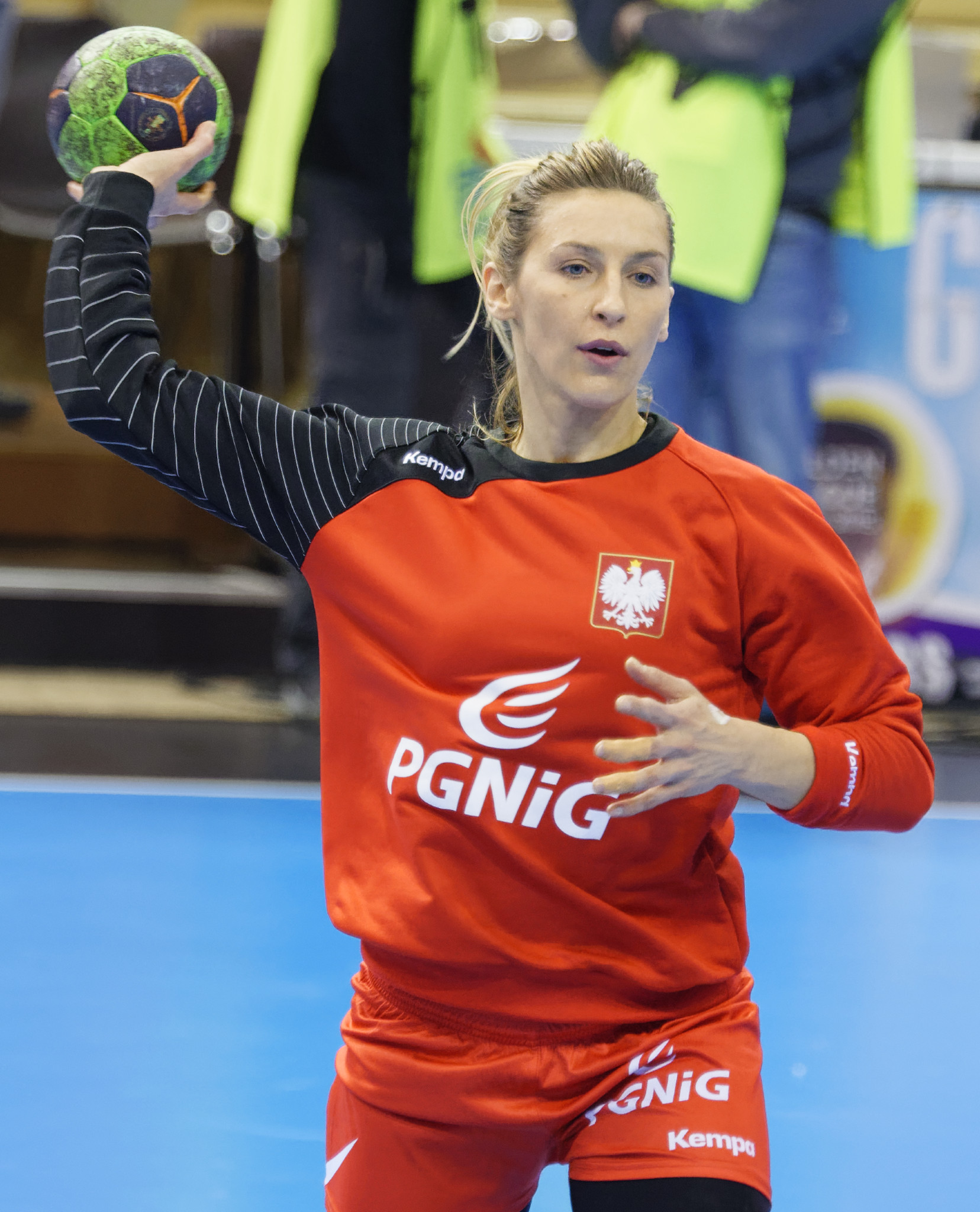 Rencontre en la Pologne et la norvège lors de la golden League de handball. A Dijon, le 19 mars 2015.